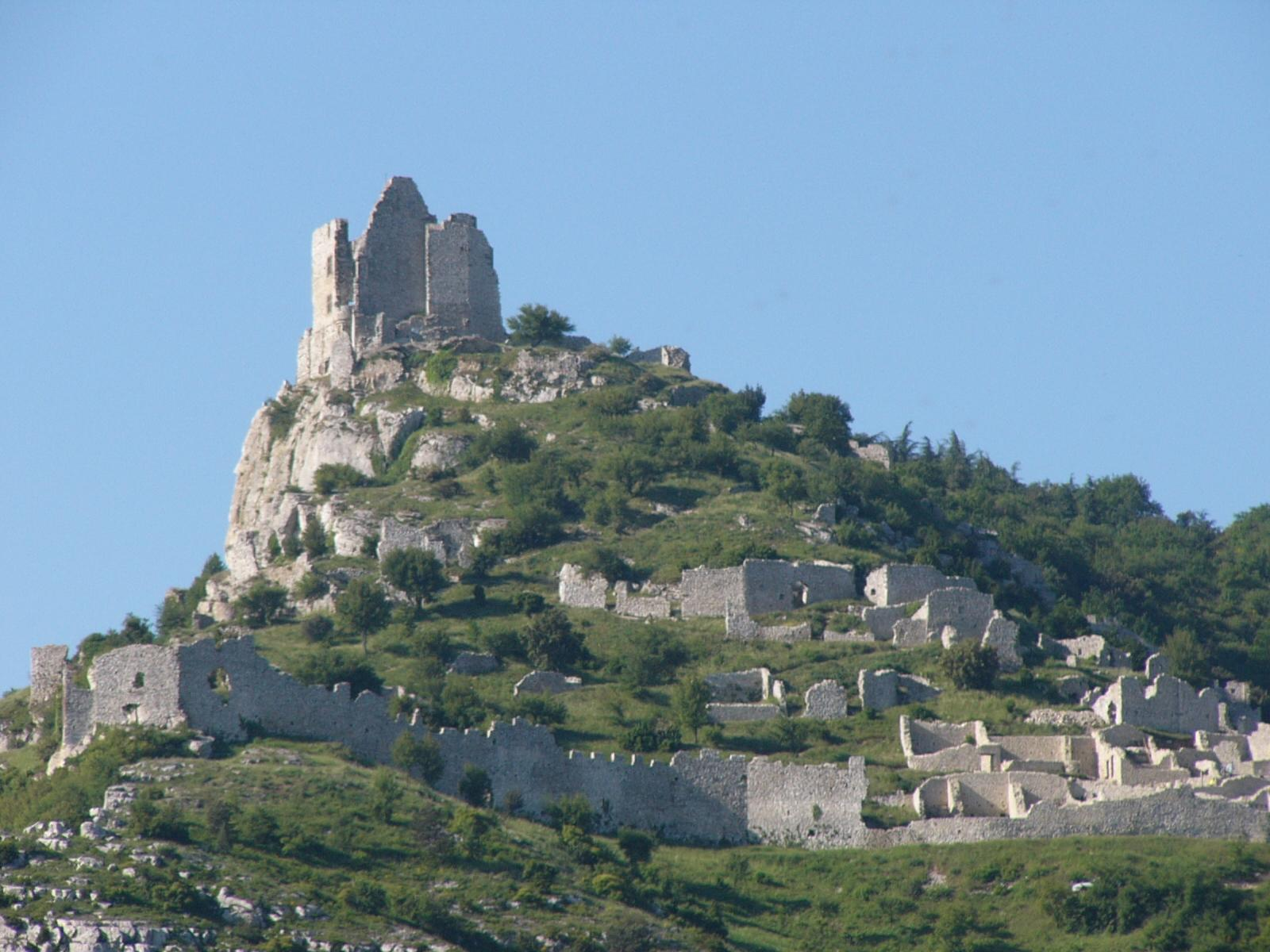 France - Ardèche - Ruines du château de Crussol